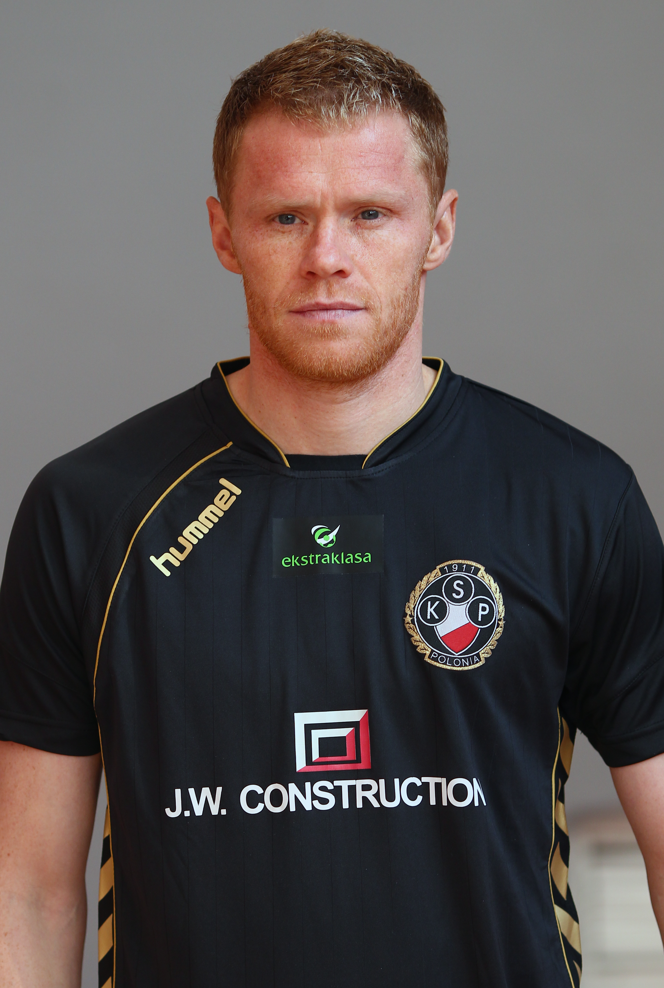 Radek Mynář, player of Polonia Warszawa (2011)